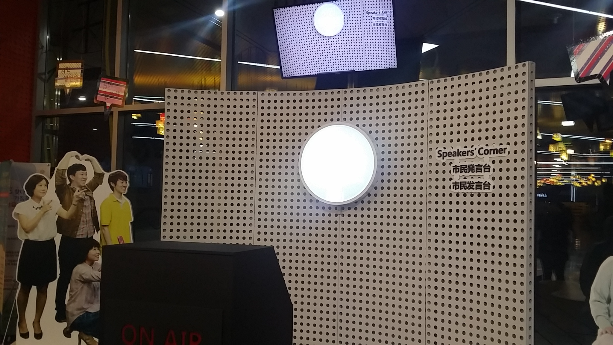 조선말: 서울 시민청 시민발언대